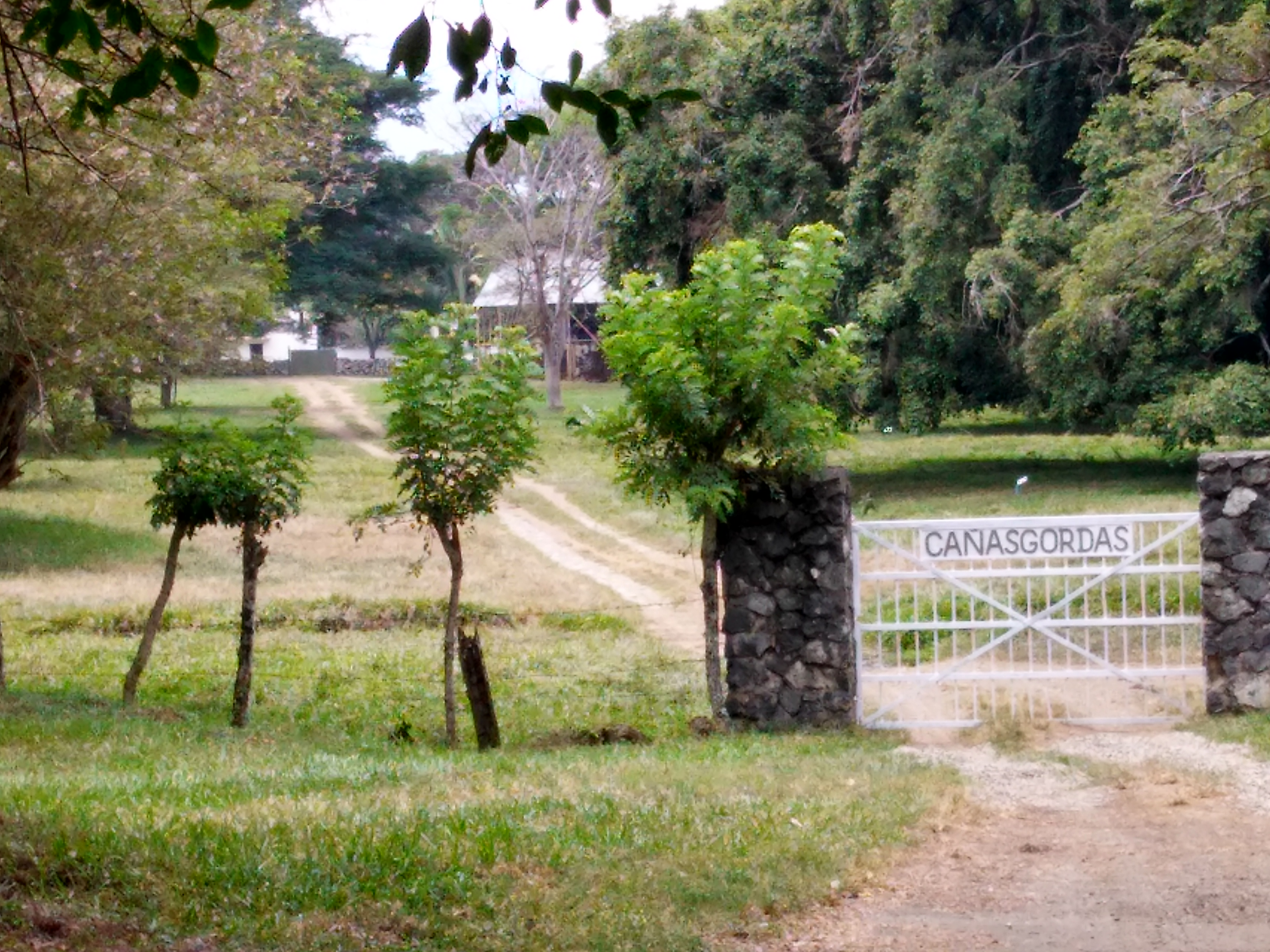 Hacienda Cañasgordas